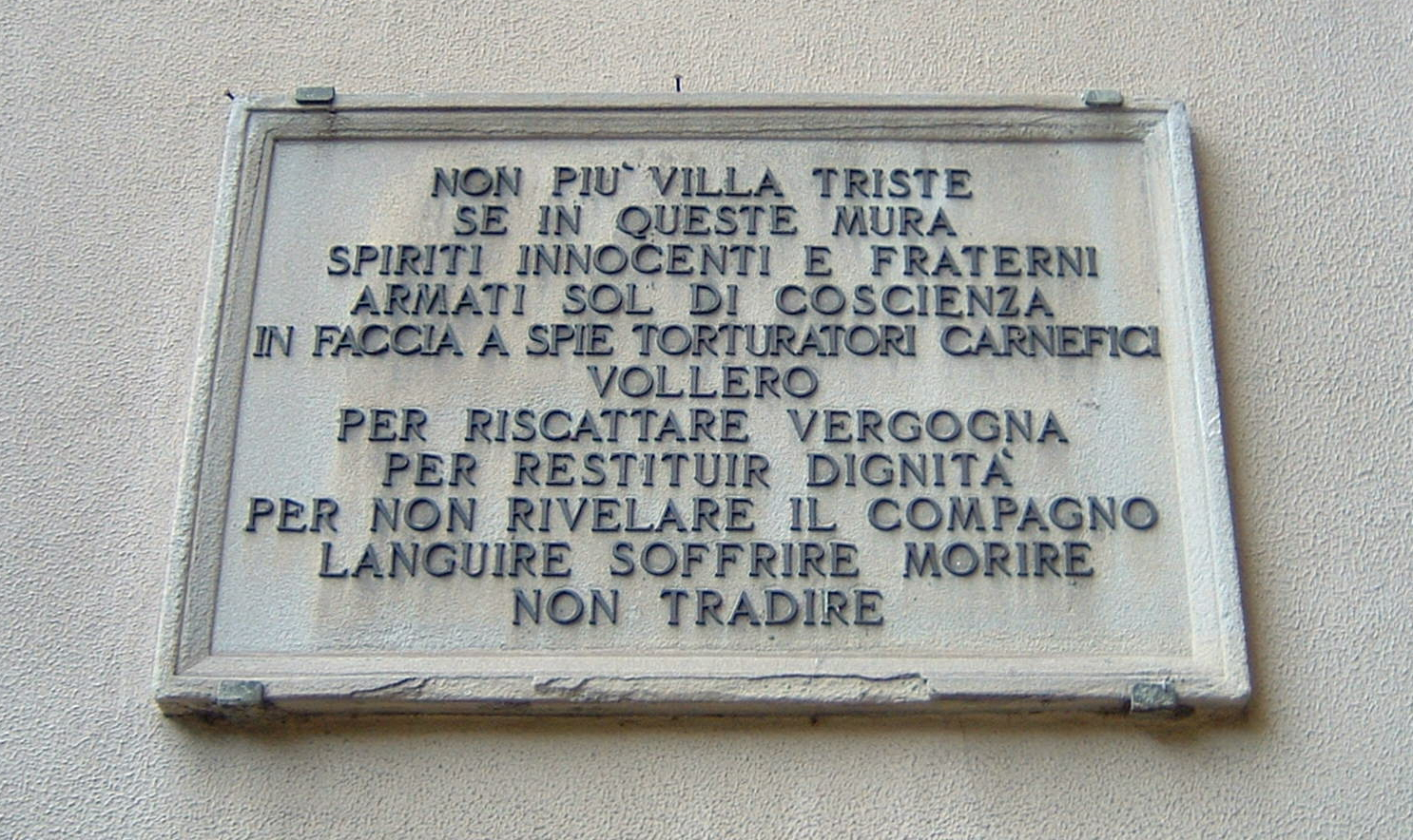 Lapide commemorativa delle vittime della Banda Carità a Villa Triste, Firenze